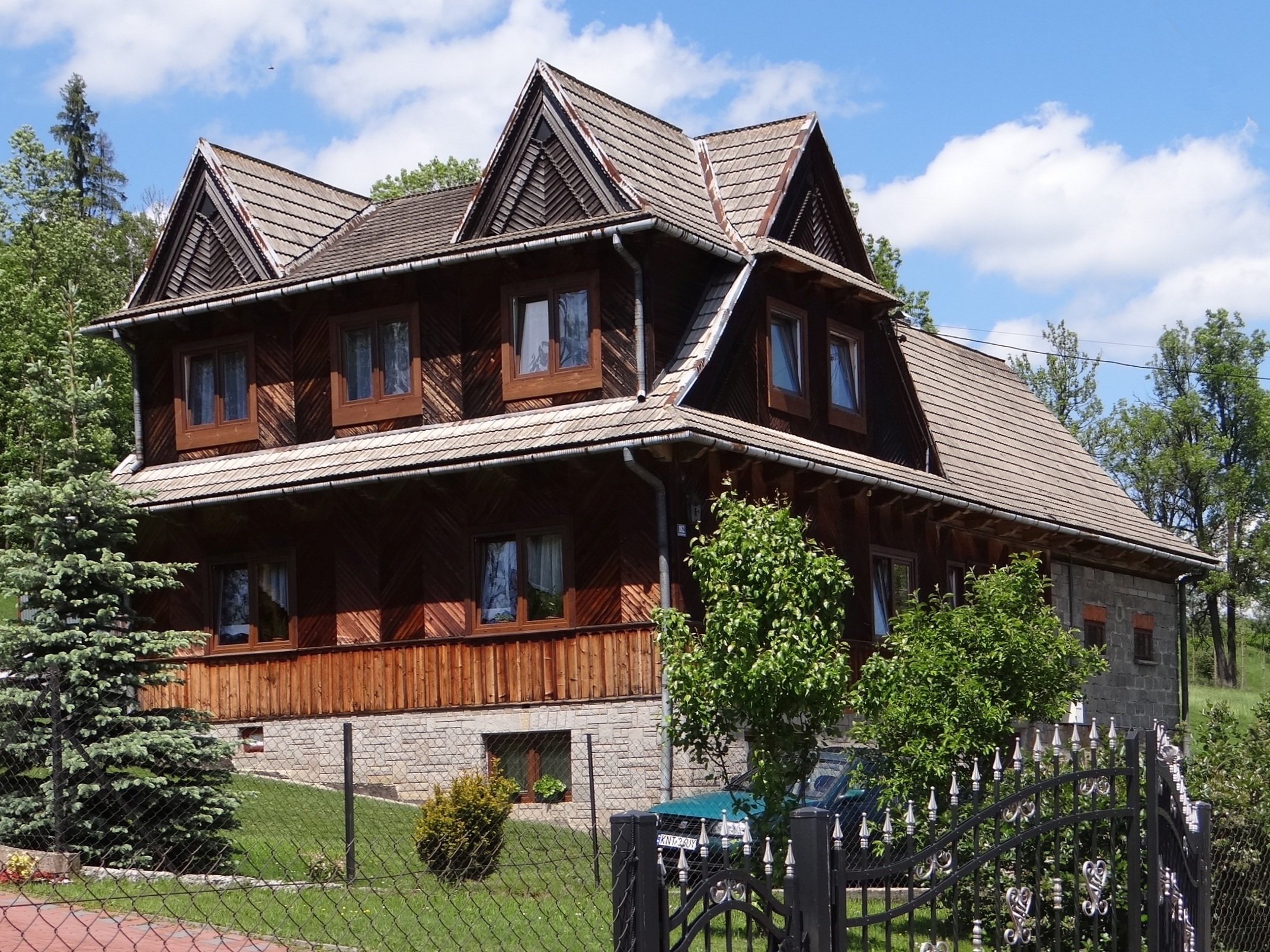 Skrzypne